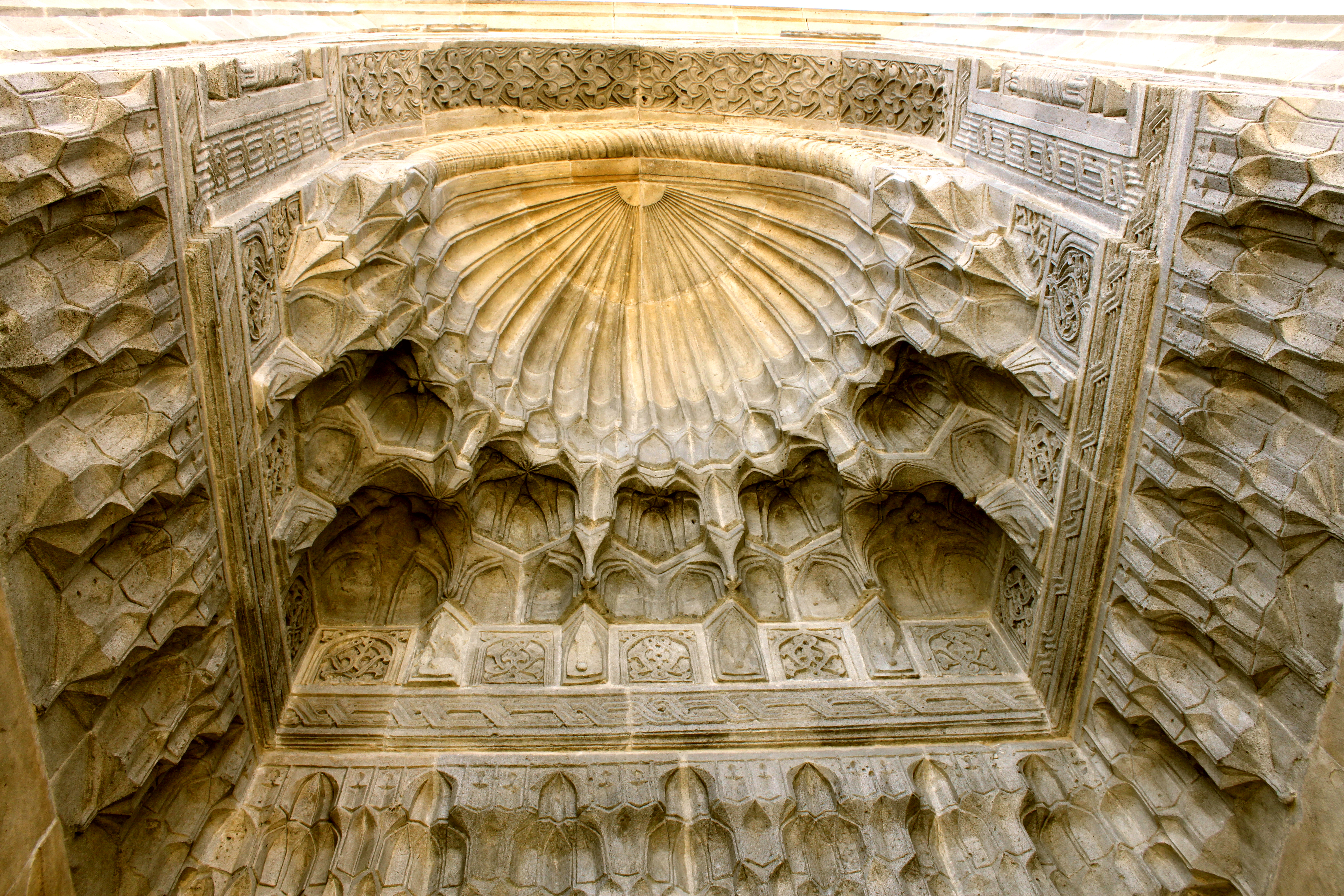 Murad darvazasının baştağı